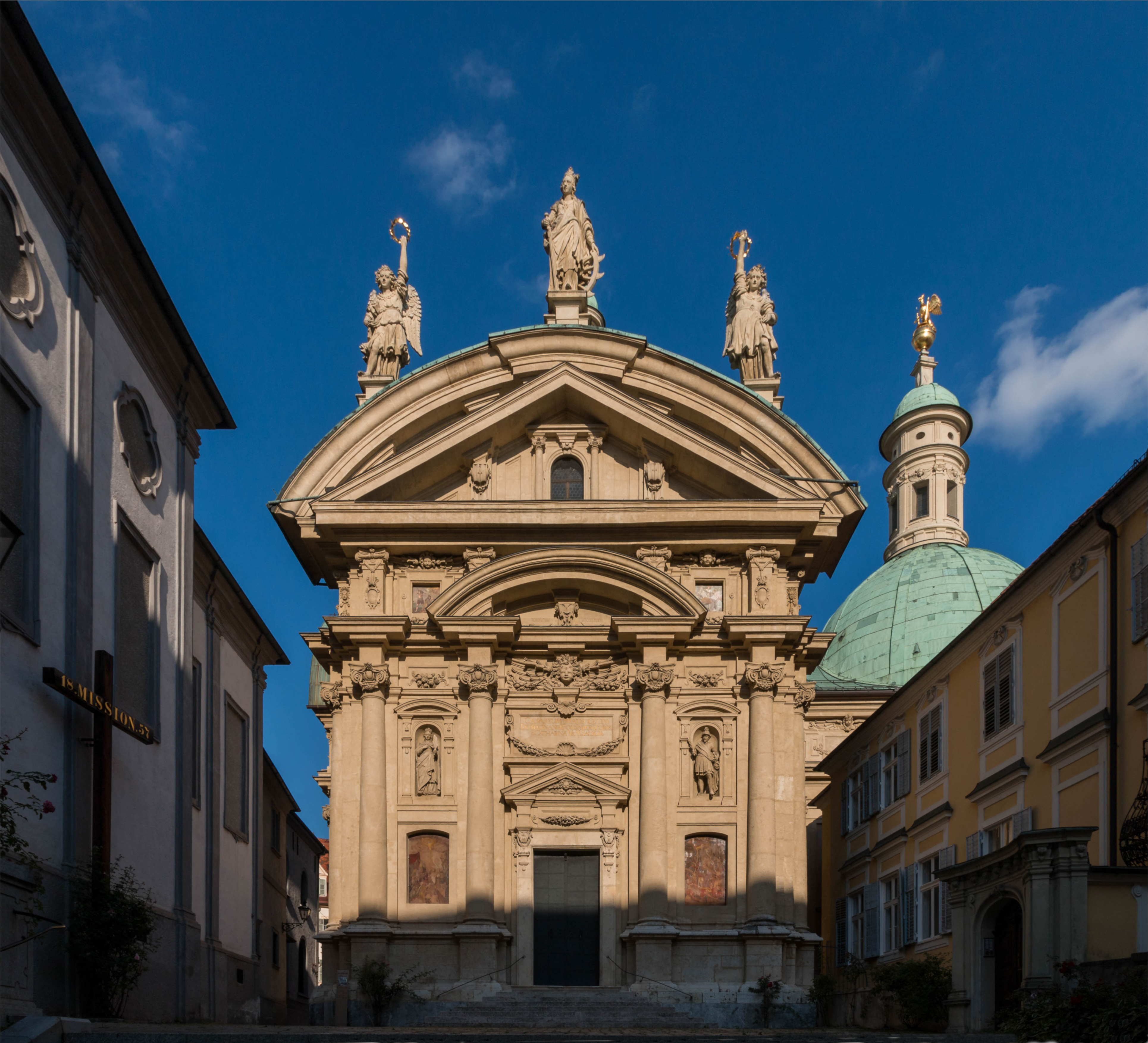 Katharinenkirche